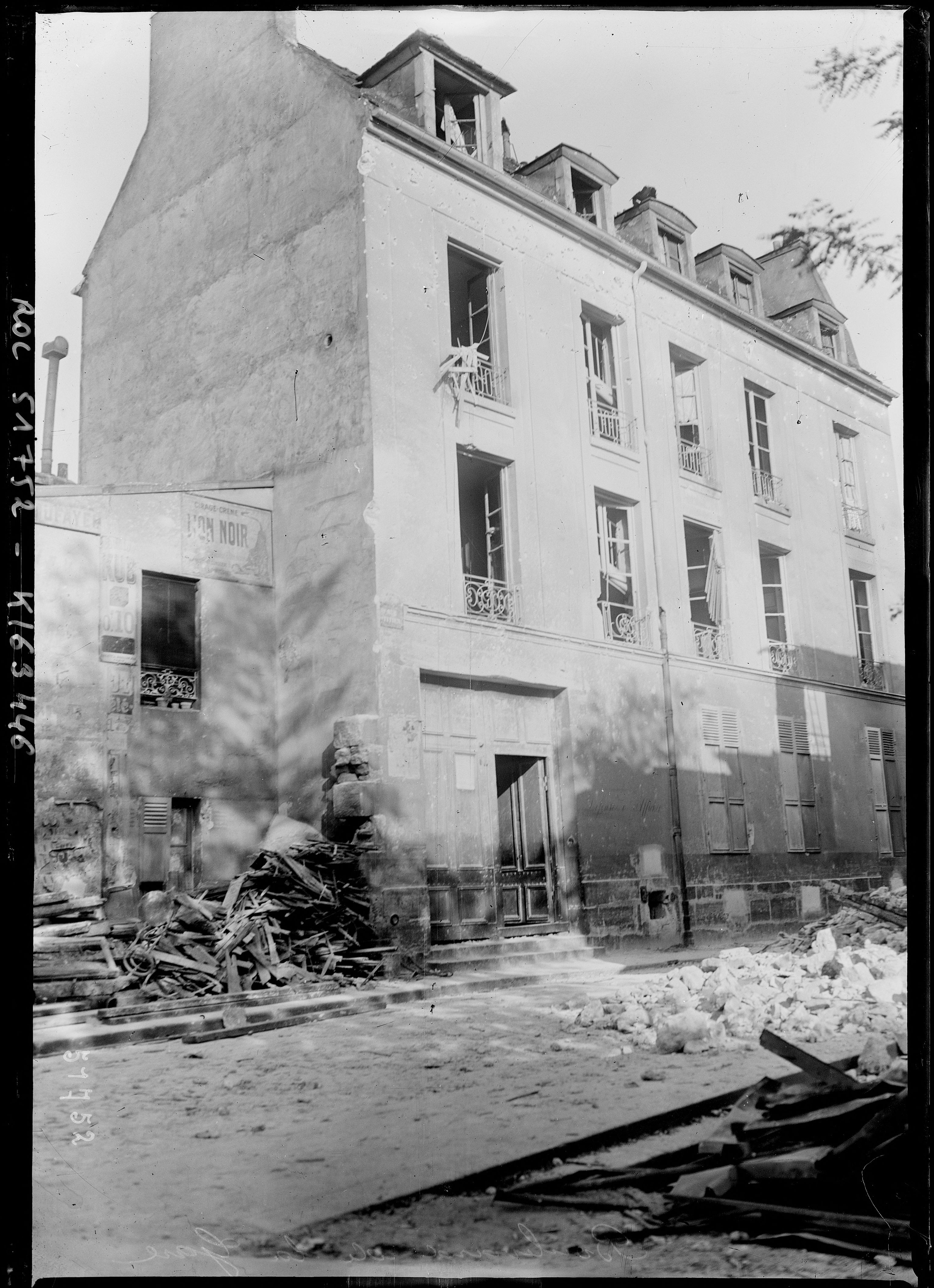 Le boulevard de la Gare (boulevard Vincent-Auriol) après le bombardement du 2 juin 1918